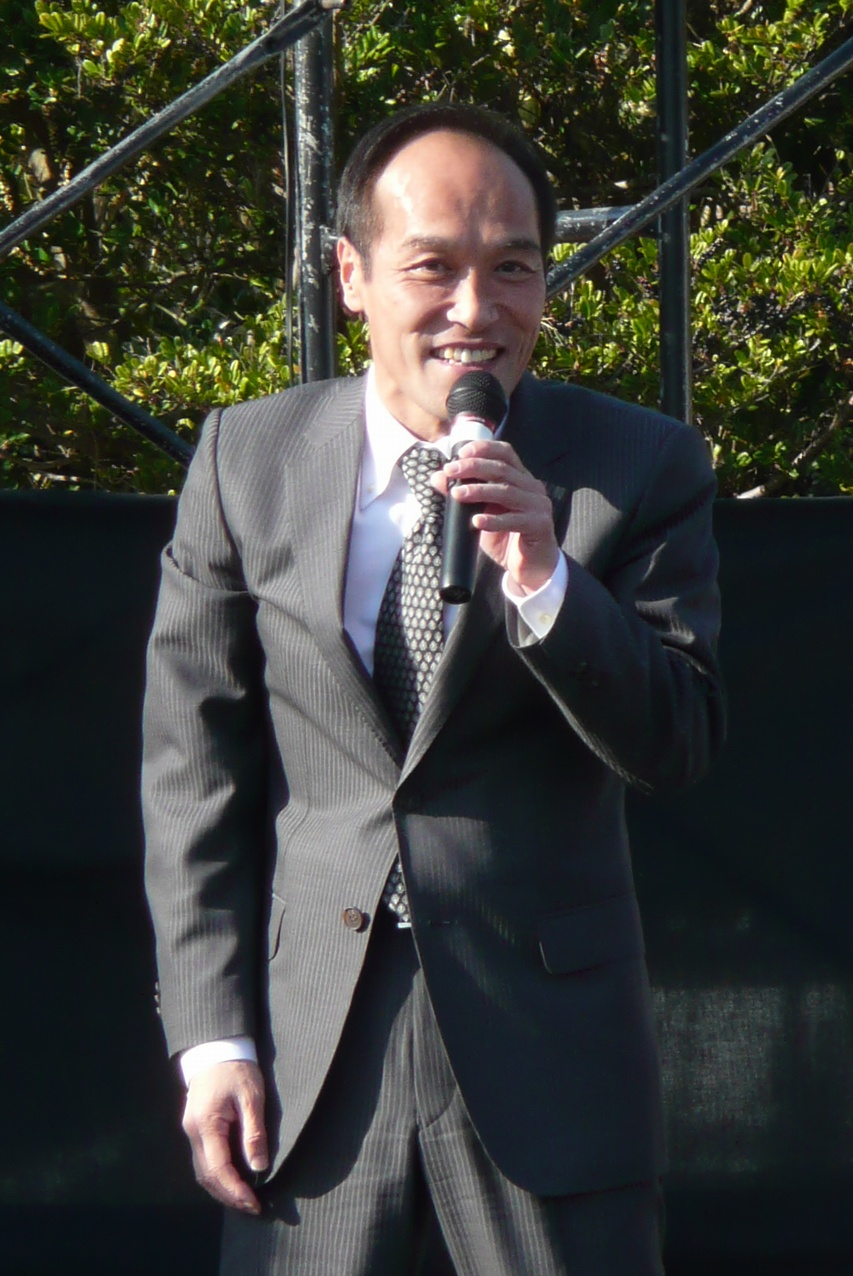 2007/12/16 東国原英夫（宮崎県知事）撮影後トリミング&リサイズ。 エフエム宮崎の「FUNKY MONKEY BABYS」の公開録音のゲスト出演時。エフエム宮崎側からの撮影に関する注意はなし（同日17時からイオンモール宮崎で開催されたFUNKY MONKEY BABYSの握手会では一切禁止とされた）。東国原知事は公人であるため画像のアップロードはOKと考えられる。 撮影&投稿者:Sanjo